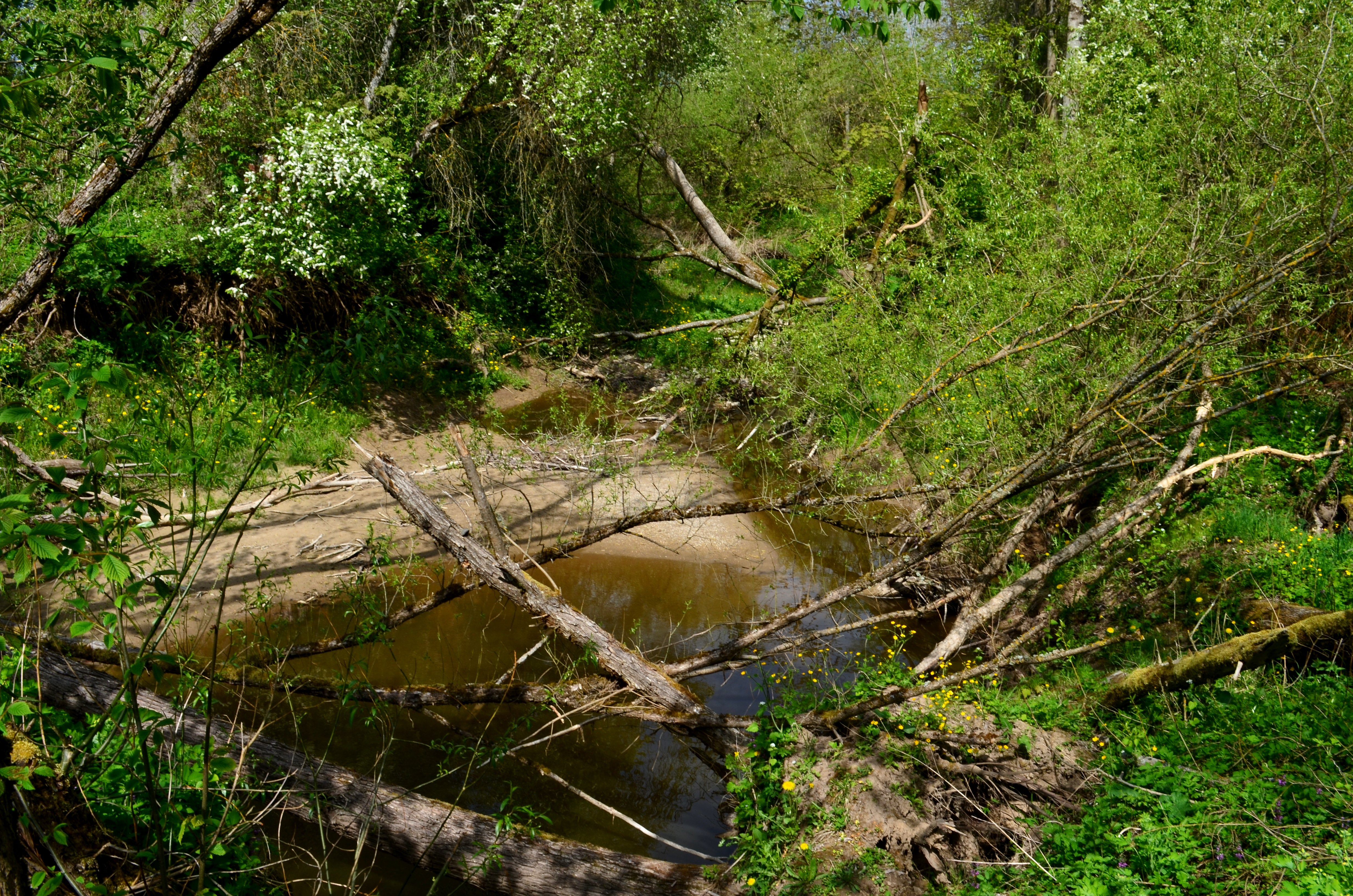 nyka ties Ilguva, Šakių raj.